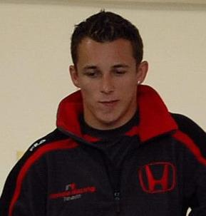 Christian Klien in 2007.